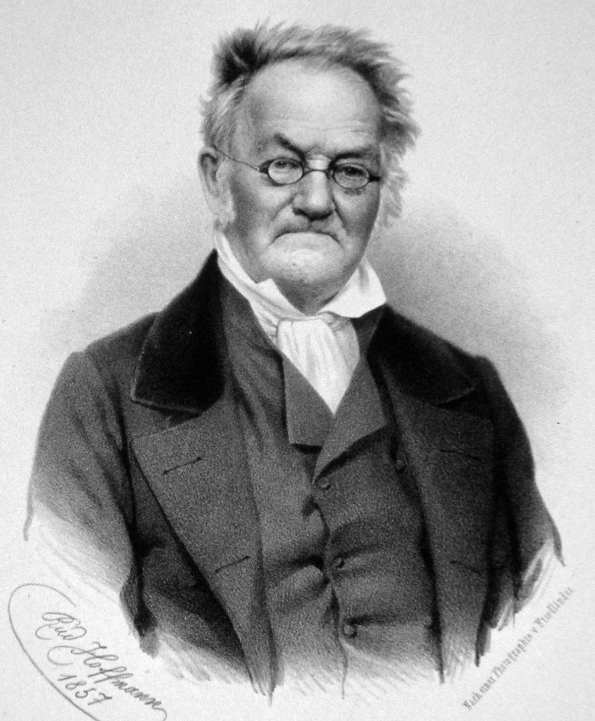 Carl Ritter (deutscher Geograph), Lithographie nach einer Fotografie von Rudolf Hoffmann, 1857